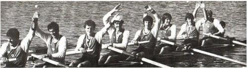 aštuonvietė su vairininku 1981